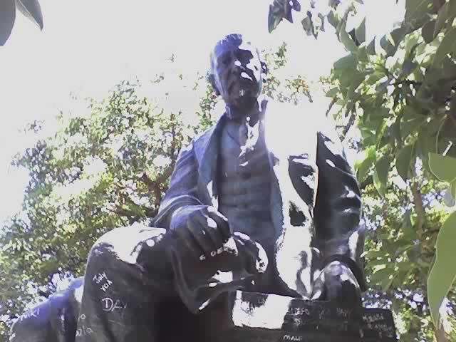 Manuel Fresco, político conservador argentino, padre de Manuel Fresco, gobernador de la Provincia de Buenos Aires.